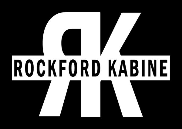 Rockford Kabine Logo